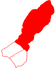 Ubicación de la parroquia Raúl Cuenca, municipio Valmore Rodríguez, estado Zulia, Venezuela